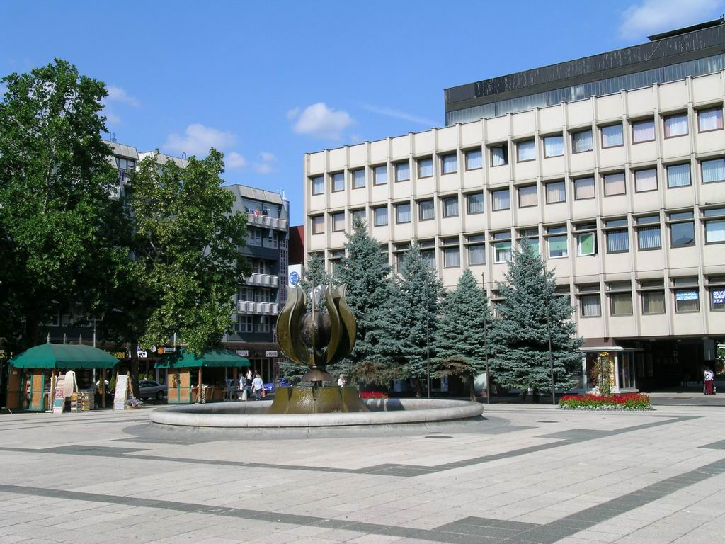 Göcseji Tulipán szökőkút a zalaegerszegi Dísz téren